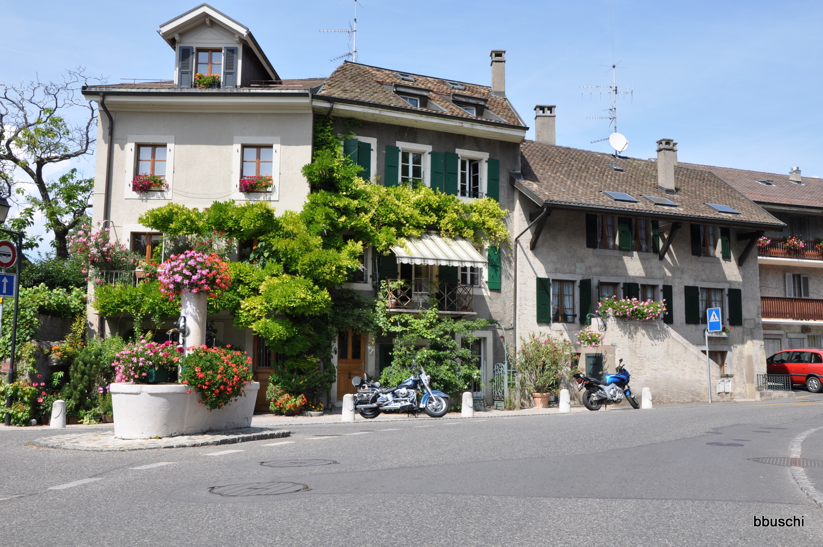 Suisse, Hermance, lieu dit Le Bourneau, Place de la Fontaine